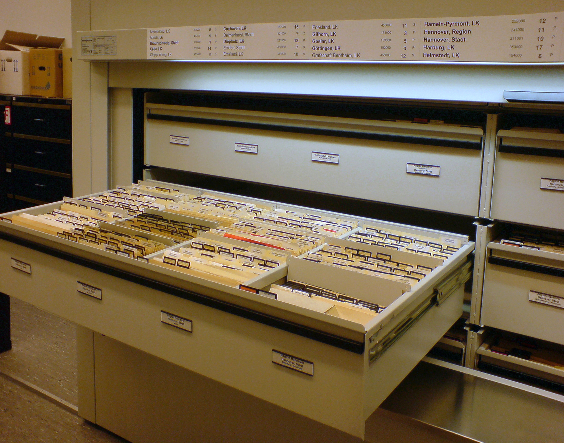 Niedersächsisches Landesamt für Denkmalpflege - altes Handarchiv in Hannover, Scharnhorststraße: Karteikarten mit Fotos, Plänen und Dokumenten, vorgestellt von Wolfgang Neß, Ko-Autor verschiedener Bände der Denkmaltopographie Bundesrepublik Deutschland